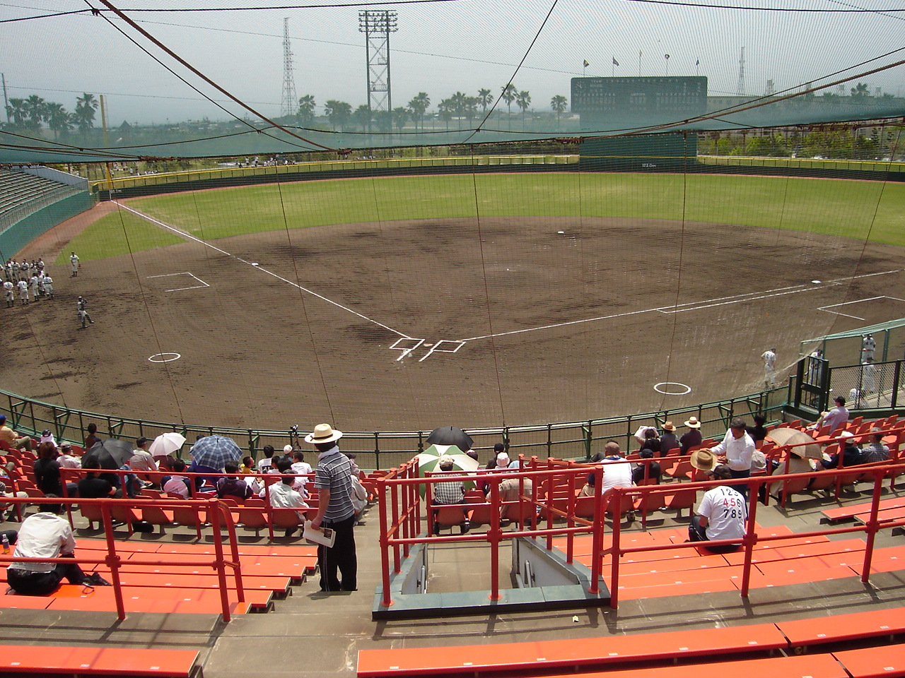 徳島県鳴門総合運動公園野球場。 - 日本国徳島県鳴門市にある野球場。